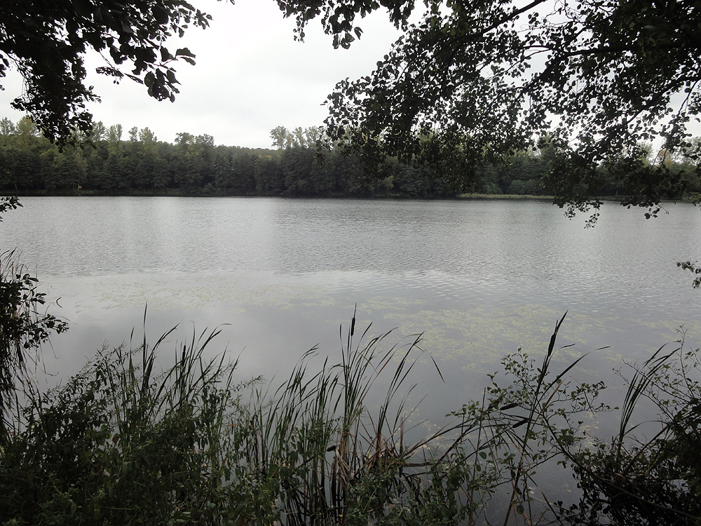 Silbersee, vom Ostufer aus gesehen